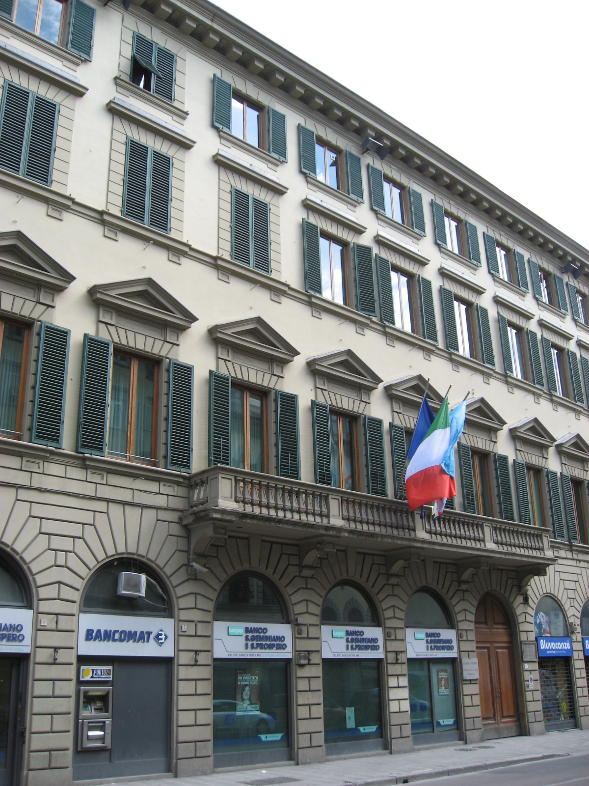 Presidenza della giunta regionale of Tuscany